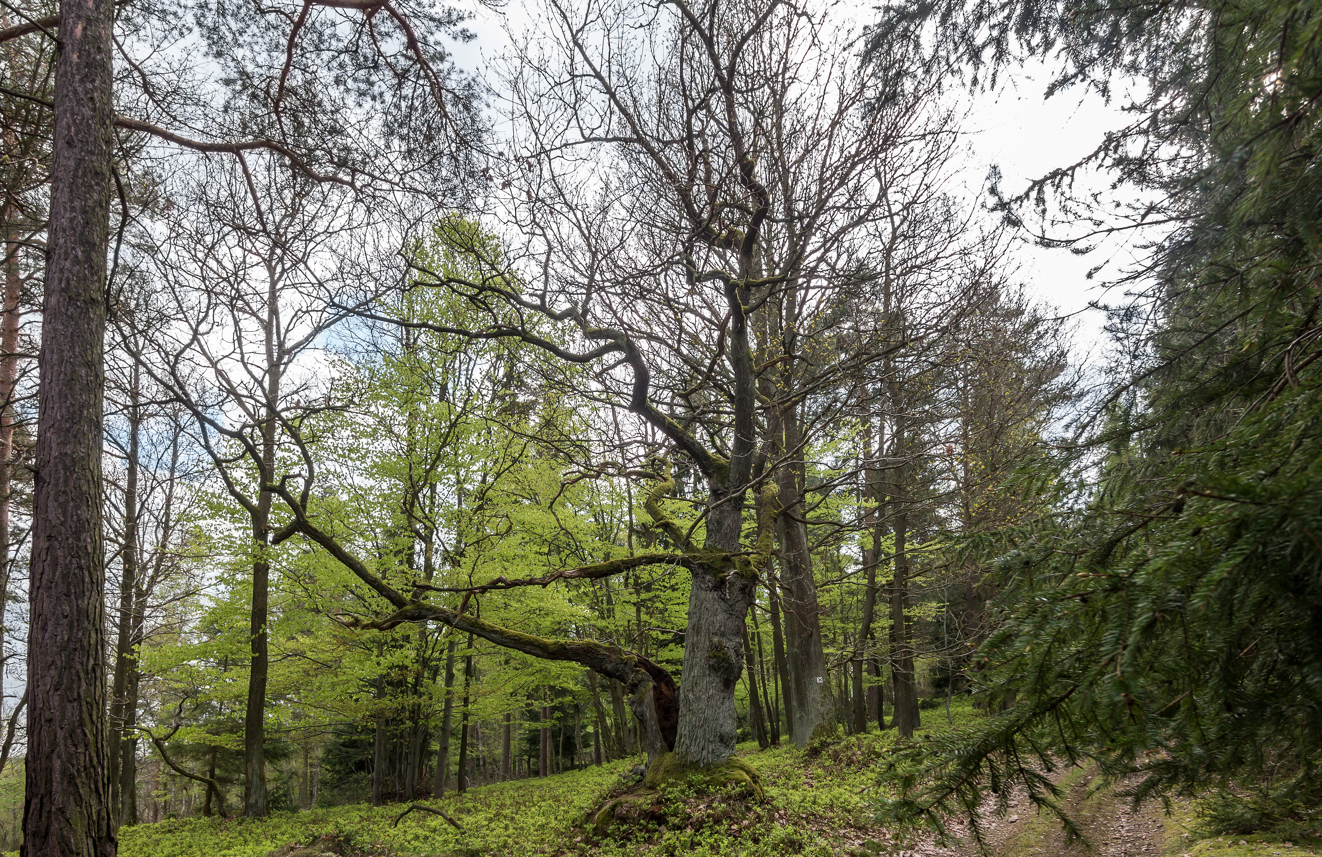 Knörzel-Eiche Listen Nr. 18 Oberwirbach I